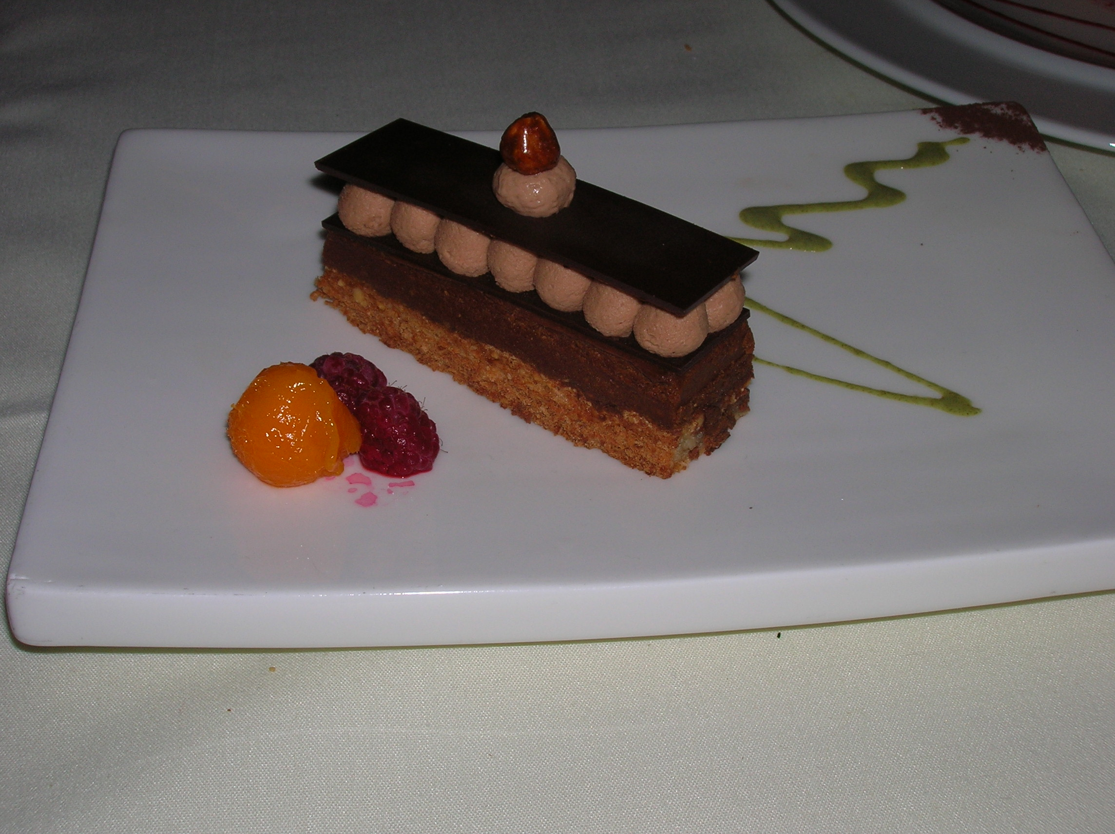 דקוואז פרלין בקלואליס